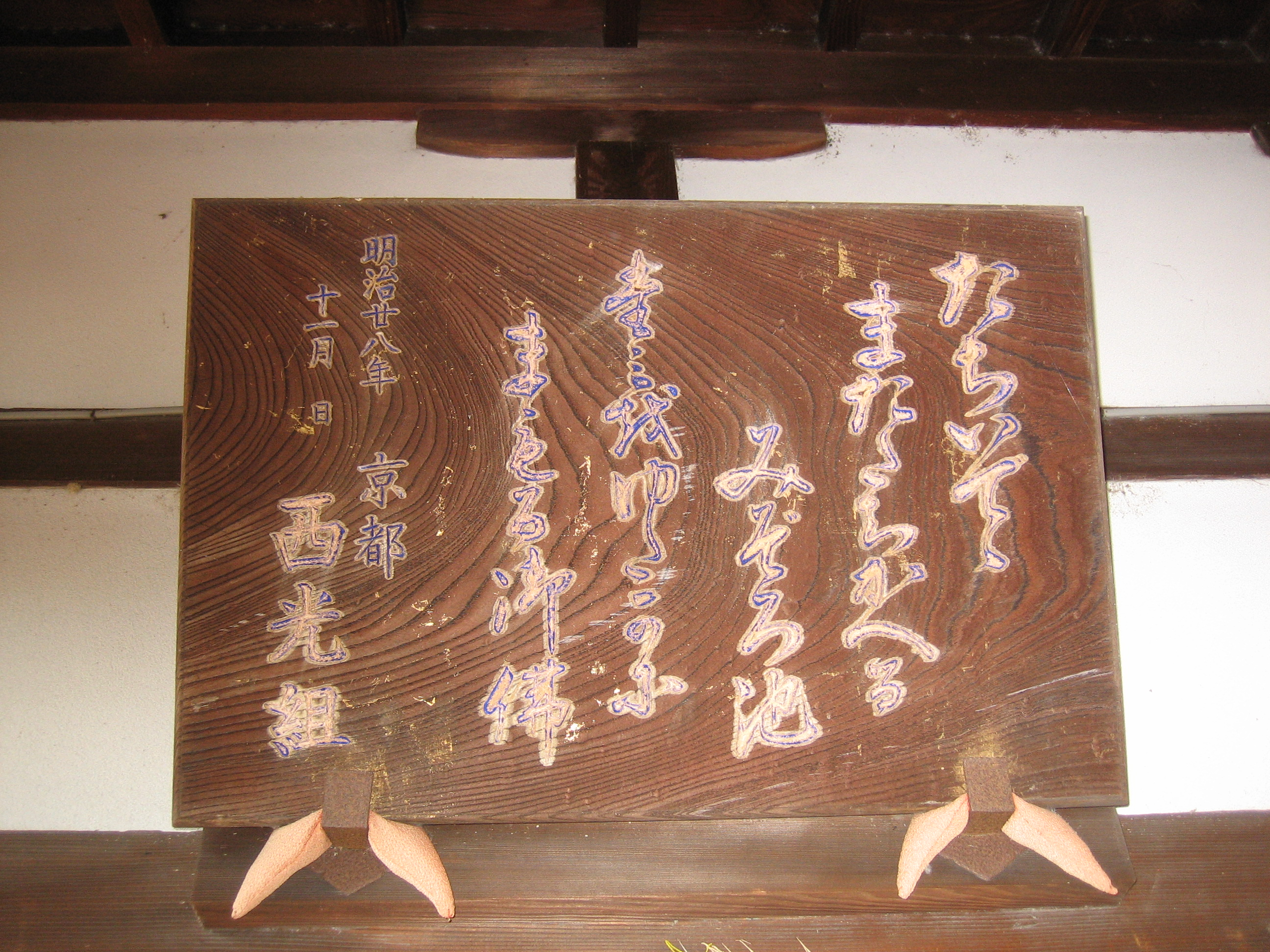 深泥池地蔵堂御詠歌額を北区上賀茂深泥池町から撮影